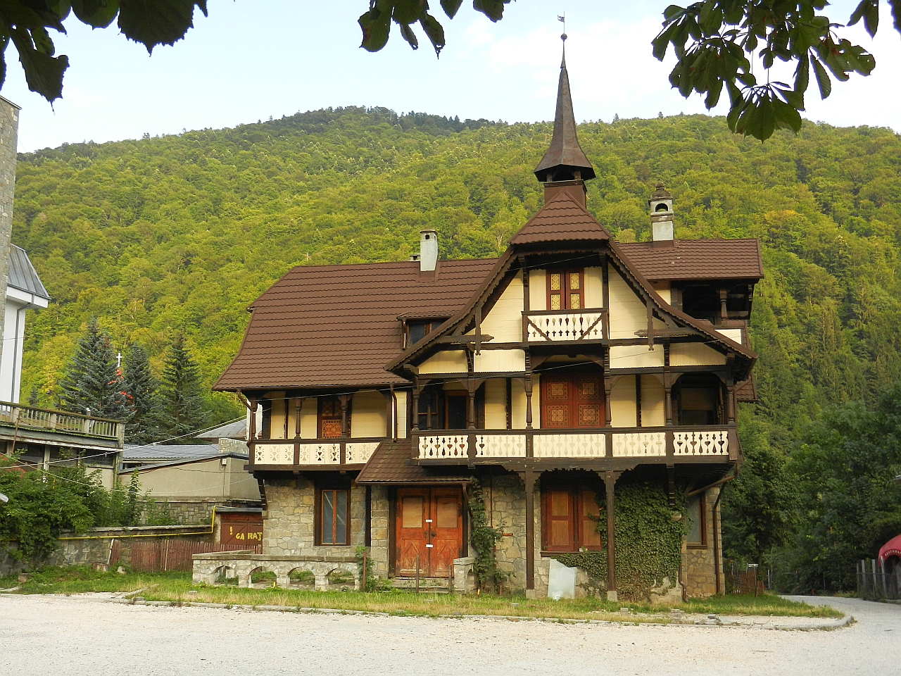 Vila Emil Costinescu